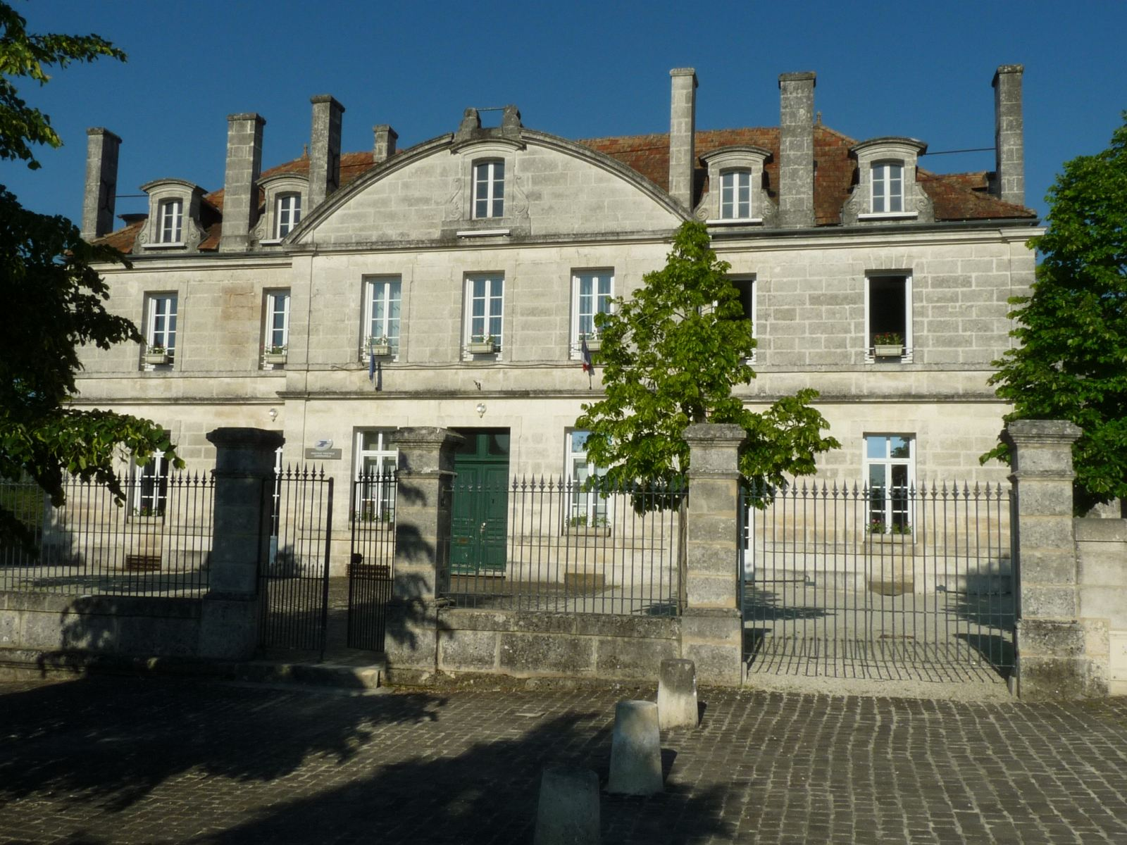 mairie de Torsac, Charente, France